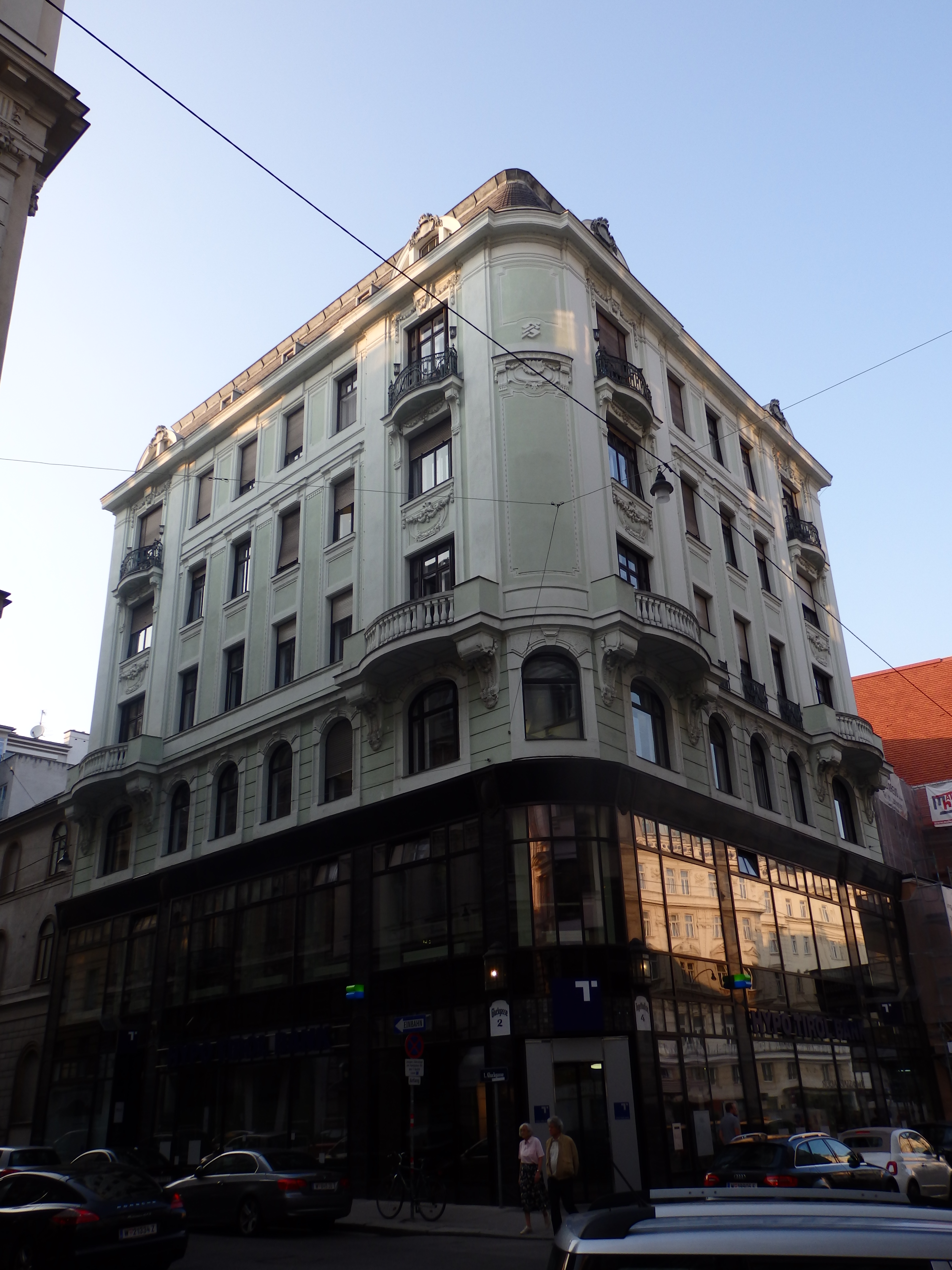 Wohnhaus (1909-10) von Siegfried Kramer, Gluckgasse 2, Wien-Innere Stadt